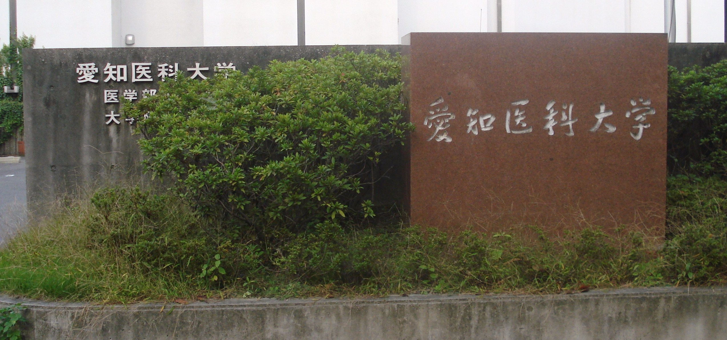 2007年10月 投稿者自身が撮影 愛知医科大学.jpg 管理